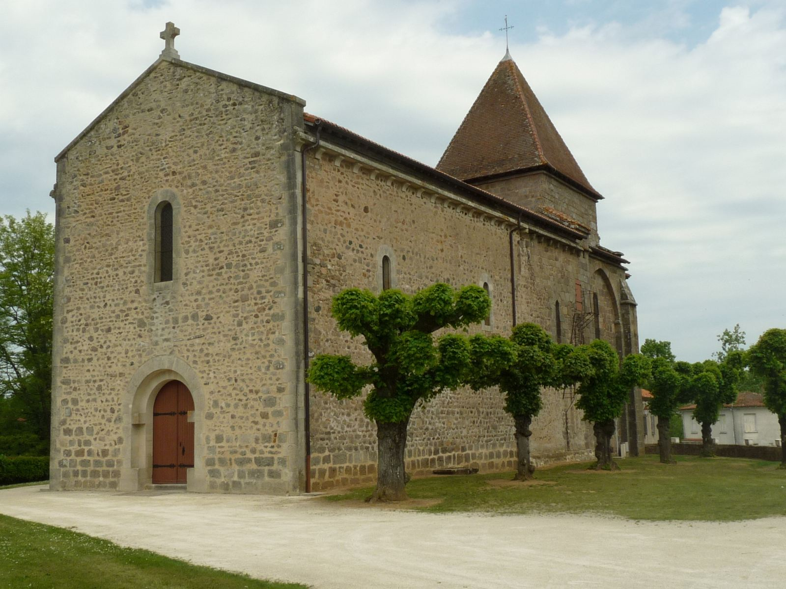 l'église d'Oradour-Fanais, Charente, France